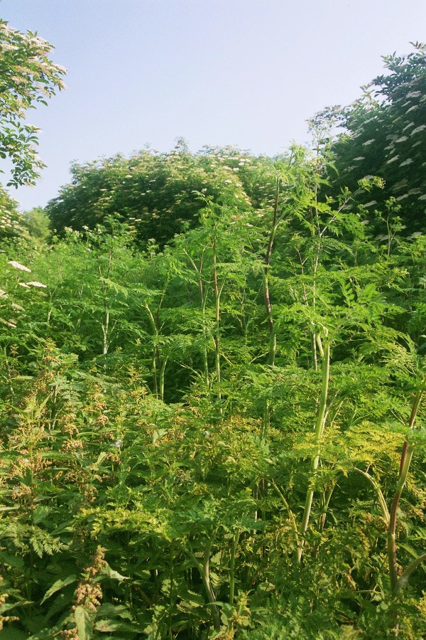 Conium maculatum jungles near Unín, Western Slovakia